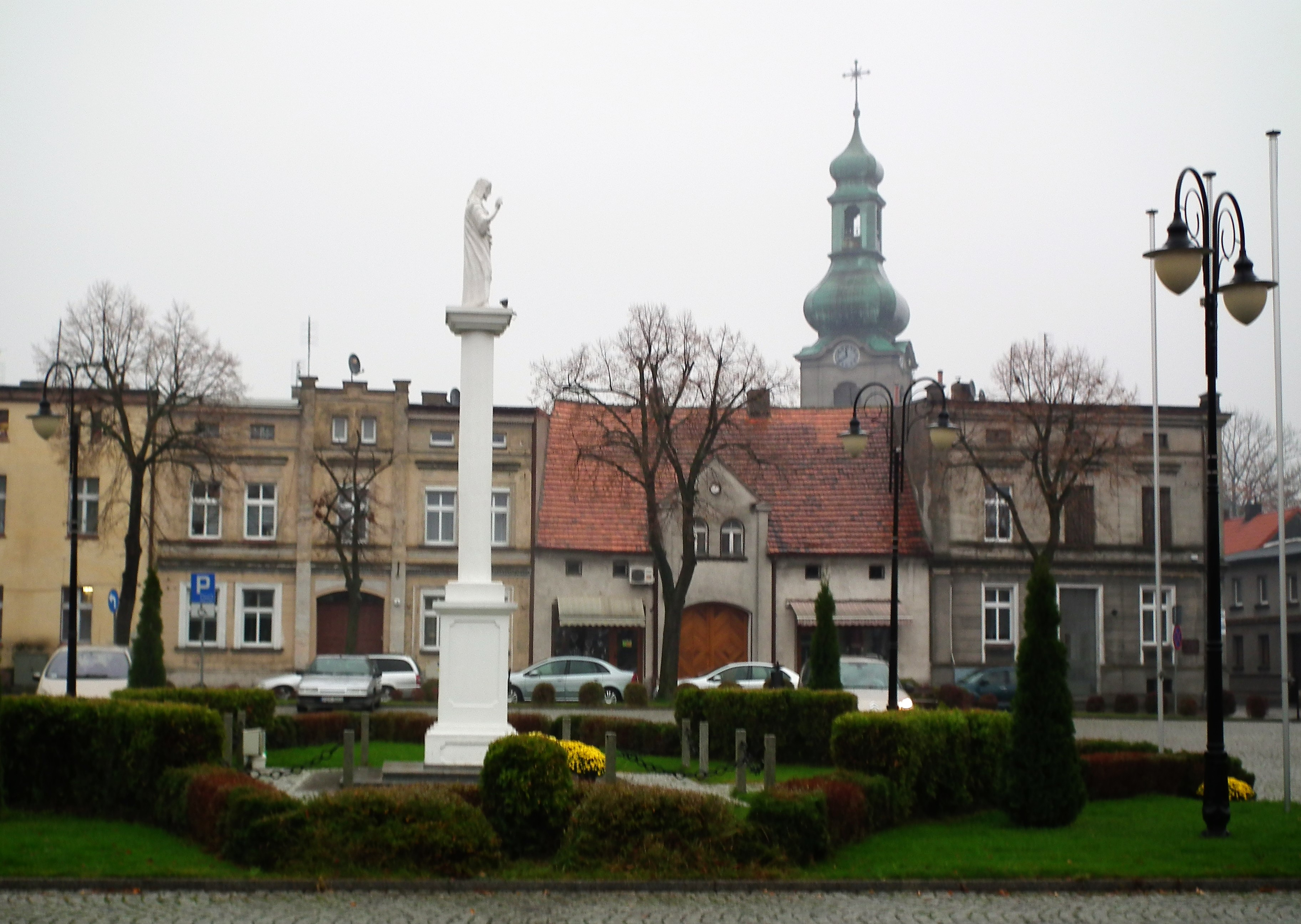 Rynek w Mikstacie.